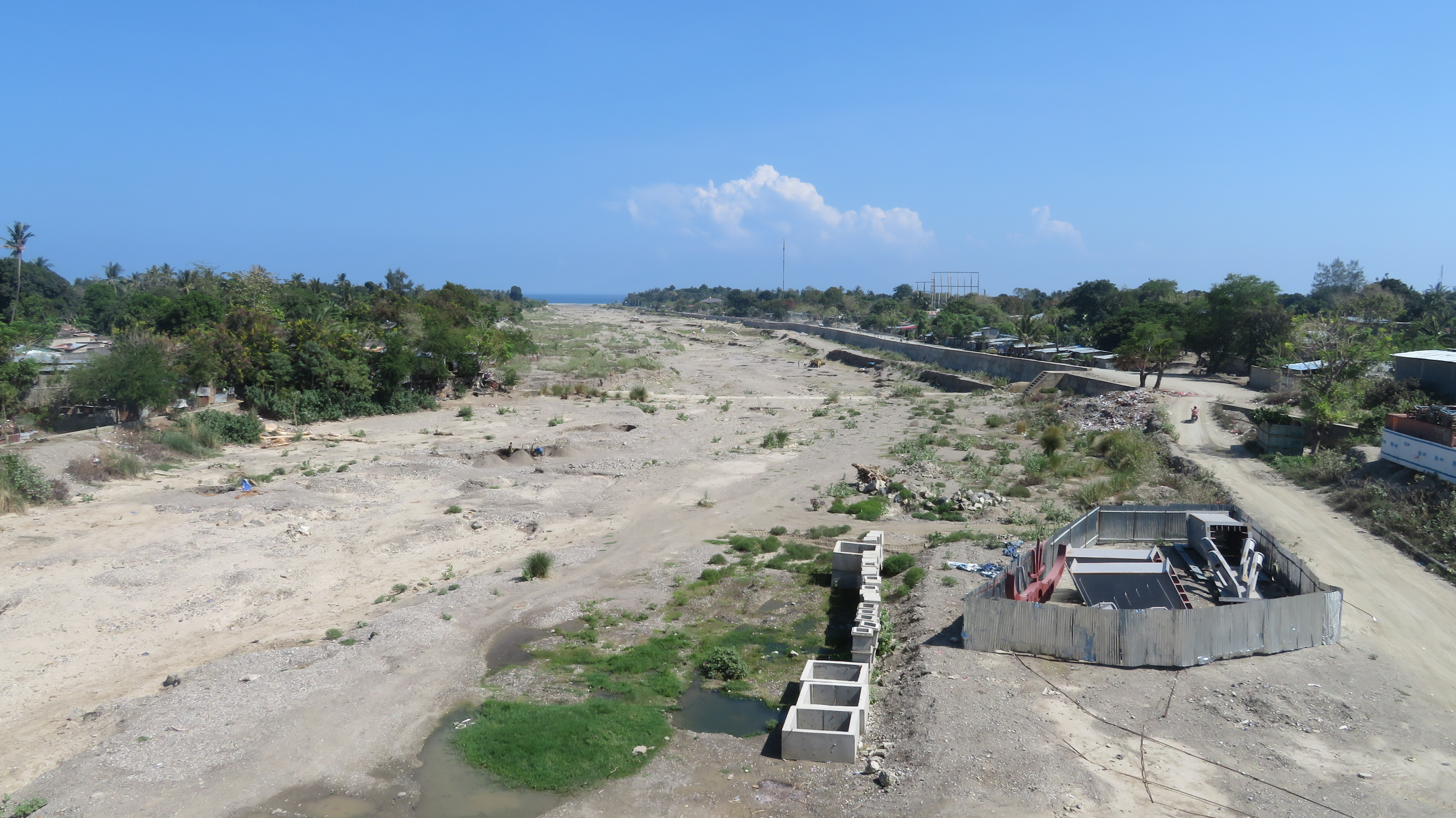 Ribeira Comoro, Dili, Timor Leste